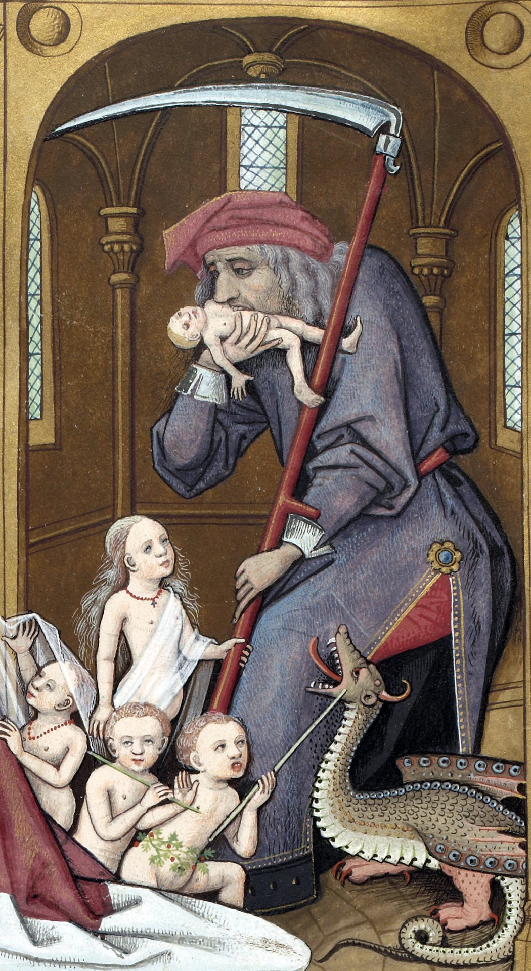 Le livre des échecs amoureux moralisés, c.1401, Evrart de Conty; detail: Saturn devouring his own children, holding his symbolic attribute of a scythe.